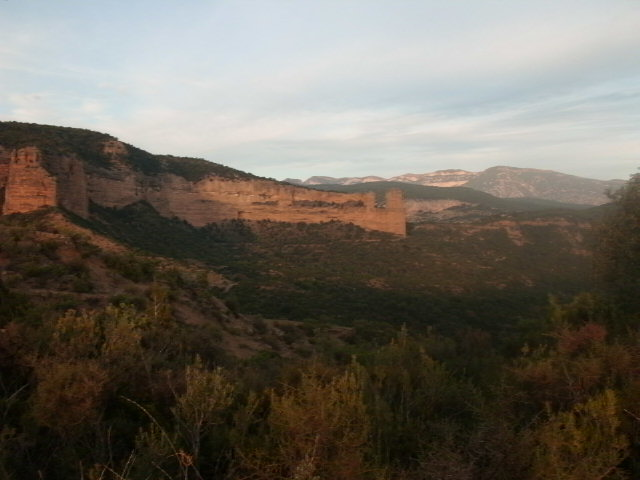 La Peña Falconera en Morrano.